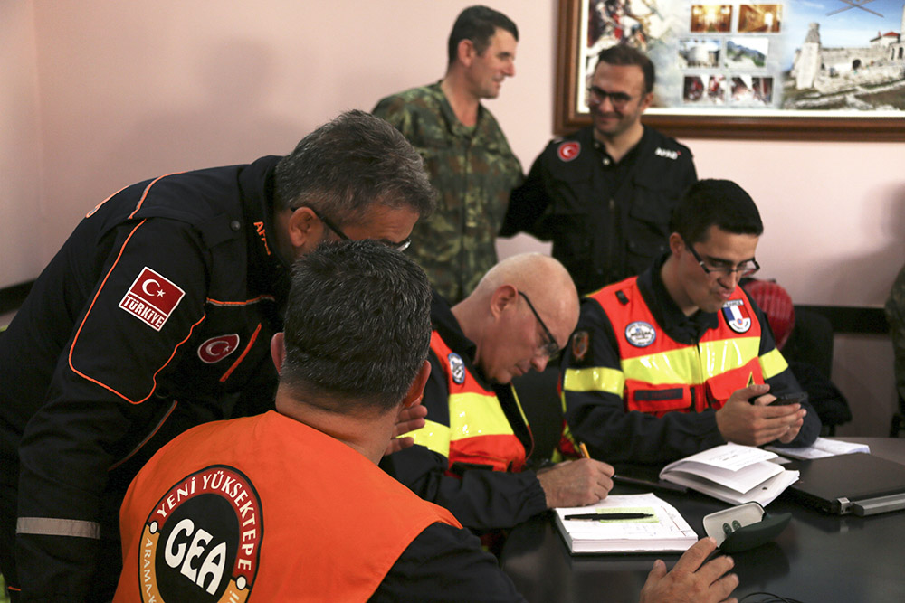 Durazzo, 27 novembre 2019 – Incontro presso la Prefettura di Durazzo. Il Sistema Nazionale di Protezione Civile si è attivato, su disposizione del Presidente del Consiglio dei Ministri, nell’ambito del Meccanismo Europeo per rispondere alla richiesta di intervento pervenuta dalle autorità albanesi in seguito alla scossa di magnitudo 6.5 che il 26 novembre ha colpito il Paese. Sono al lavoro in Albania oltre duecento uomini tra team dei Vigili del Fuoco e squadre USAR di ricerca e soccorso, personale medico AREU della Regione Lombardia, volontari delle colonne mobili delle Regioni Puglia e Molise, unità cinofile dell’UCIS e della Guardia di Finanza, tecnici del Dipartimento della Protezione Civile.